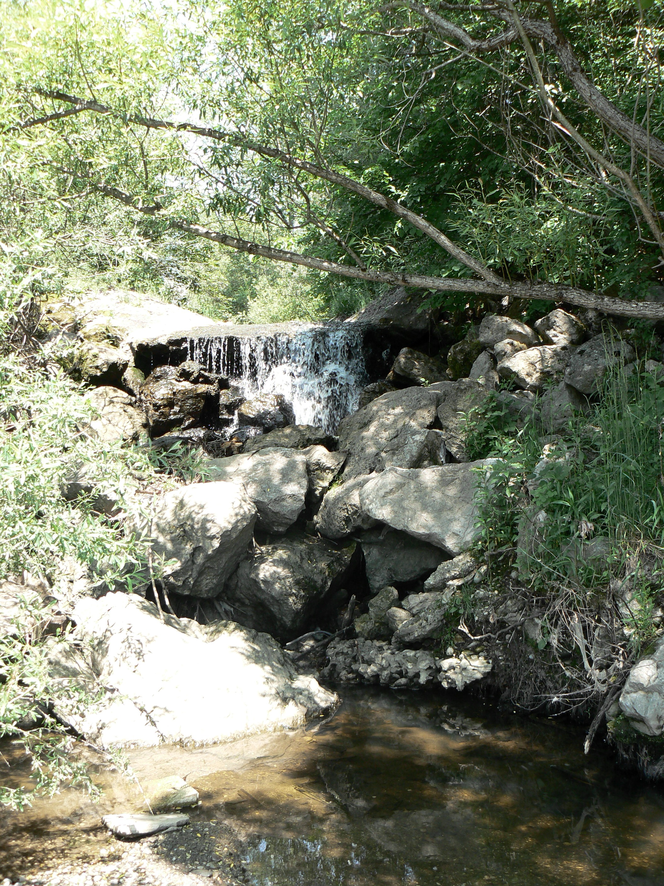 Potok Črnušnica se tu izliva v Savo.